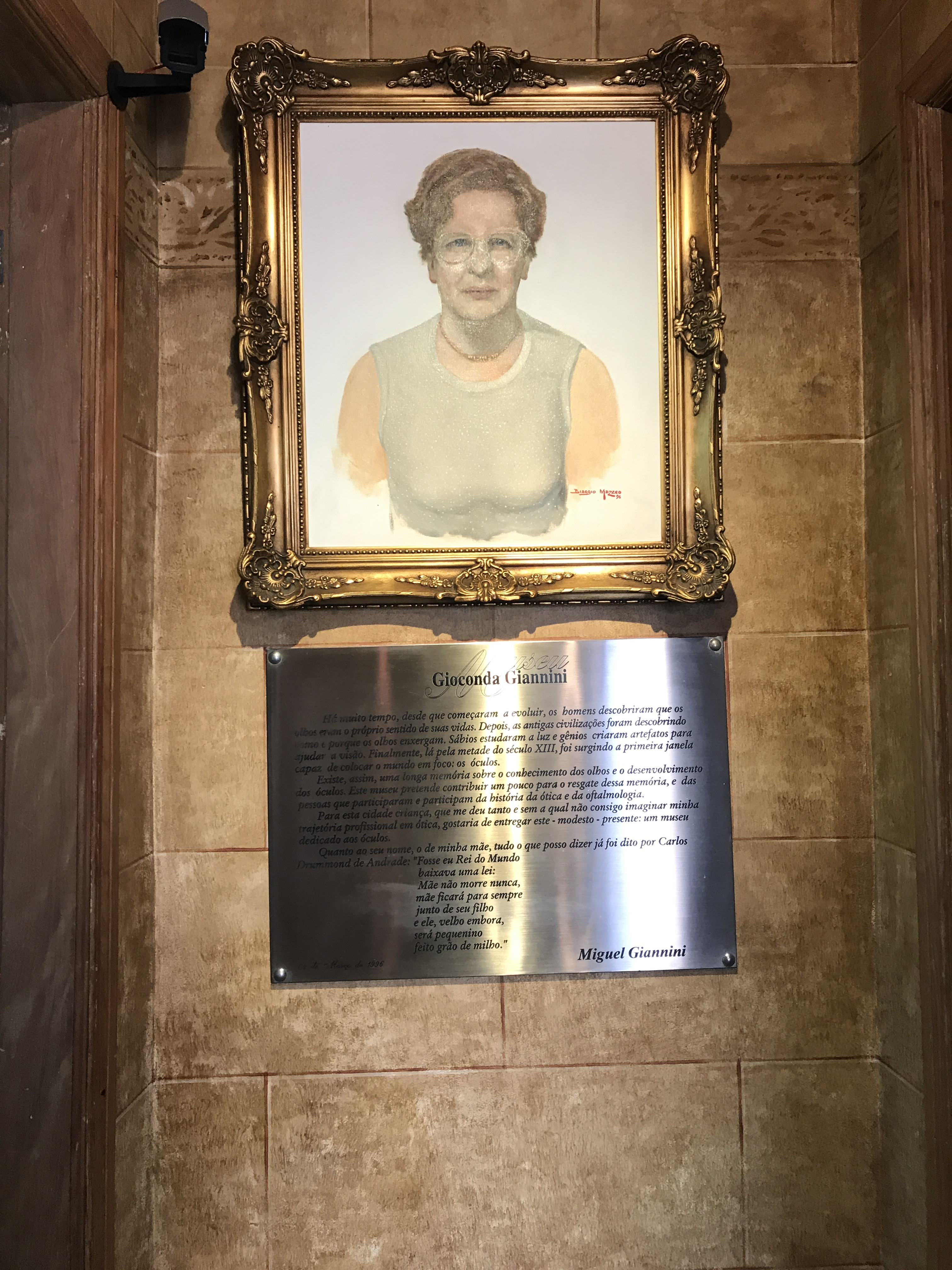 Retrato de Gioconda Giannini.